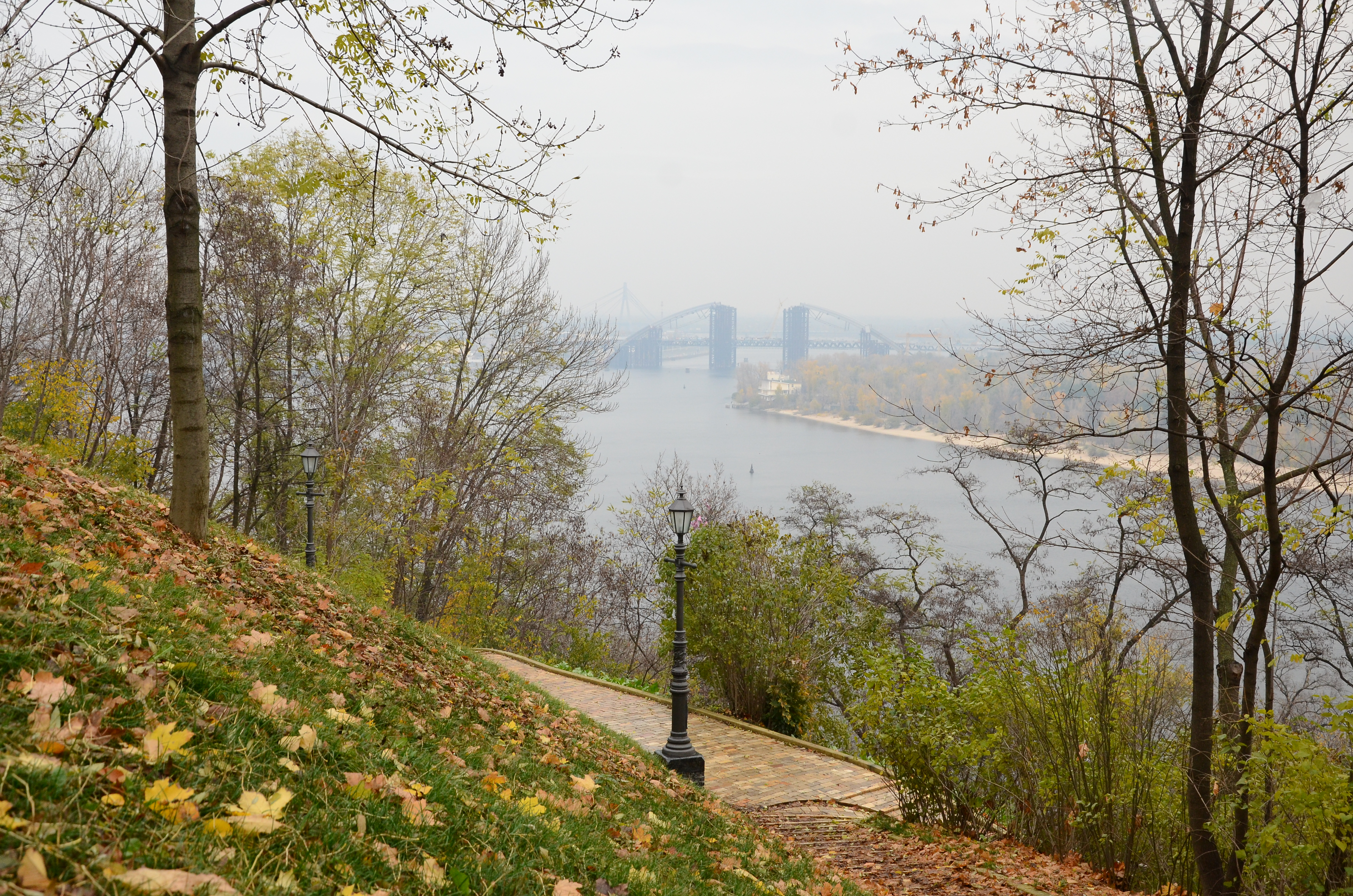 Киев.